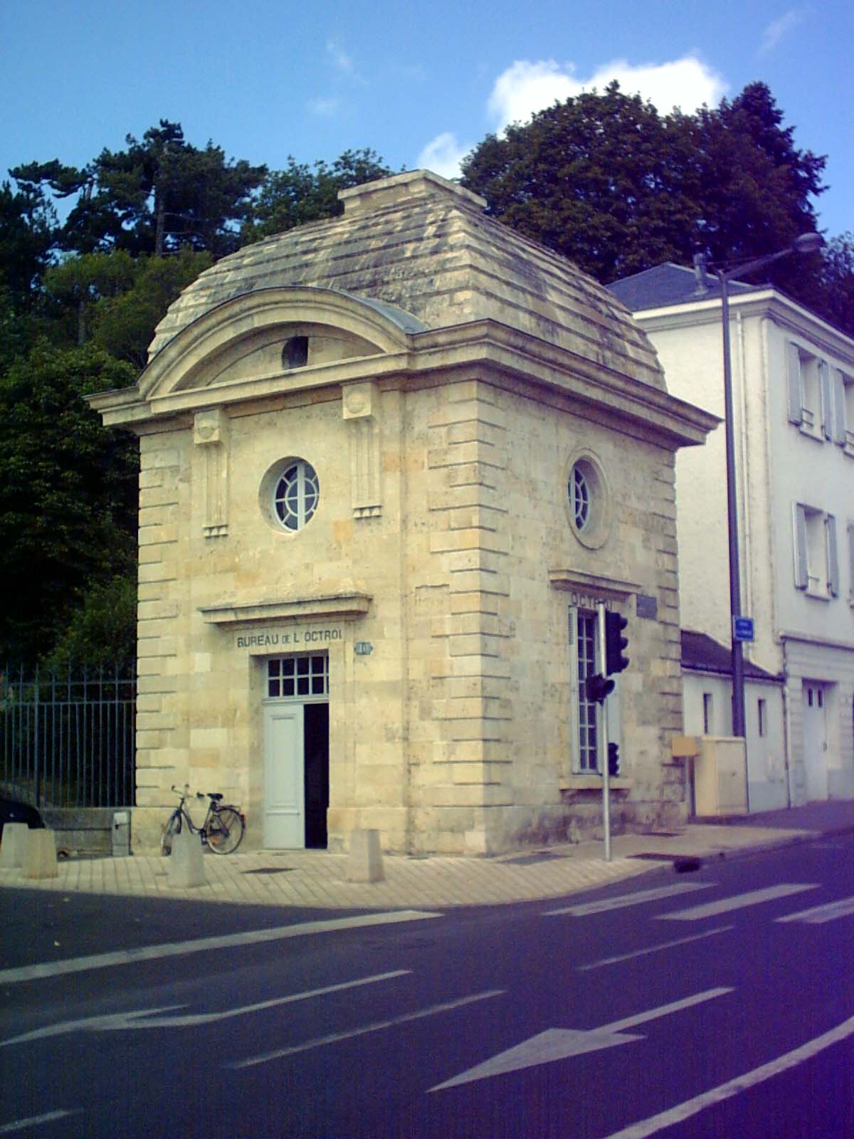 Pavillon d'octroi situé avenue de la Tranchée, à Tours. cliché personnel